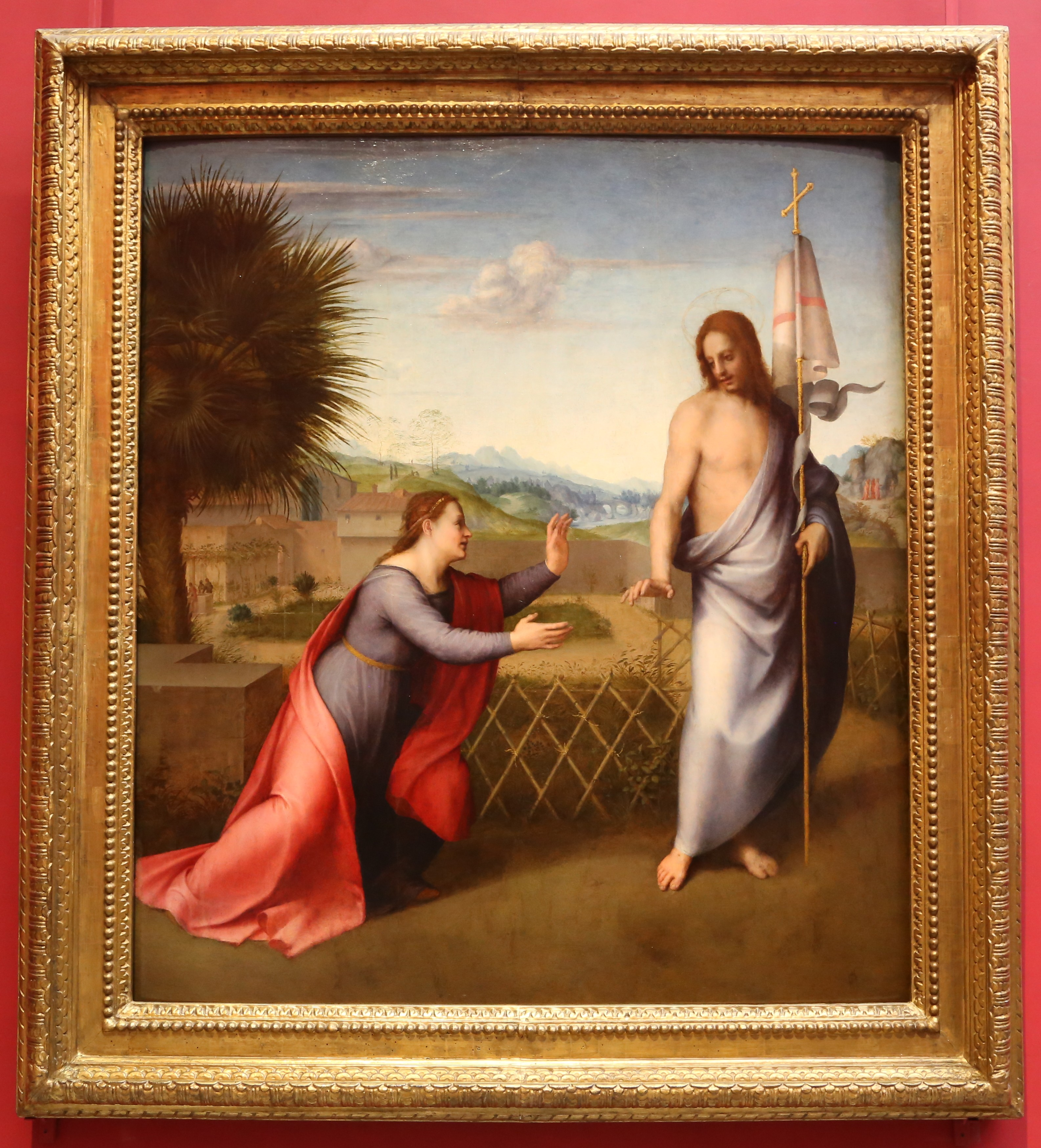 Noli me tangere